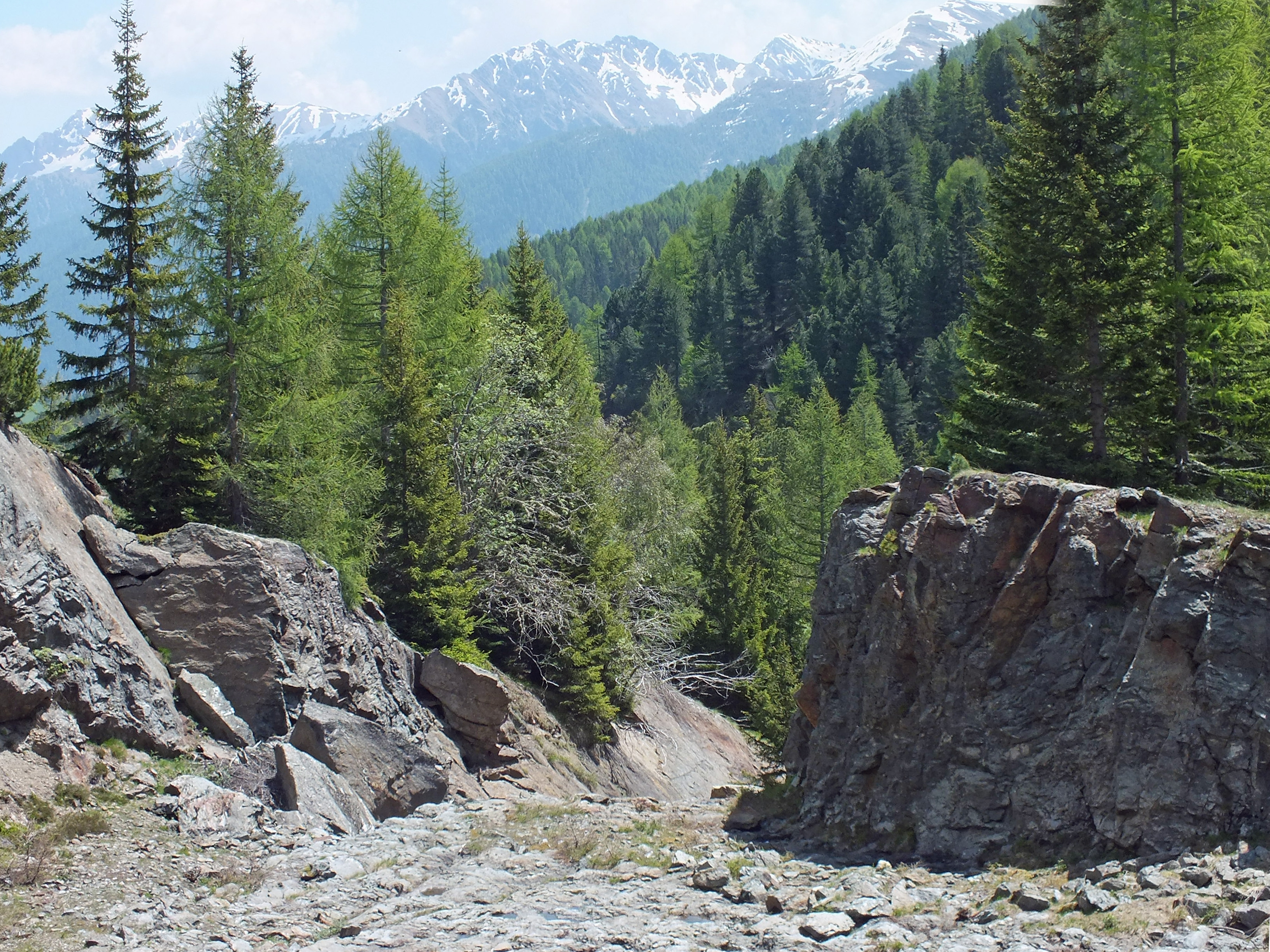 Das Überlaufbett vor dem nördlichen Staudamm des Weißbrunnsees